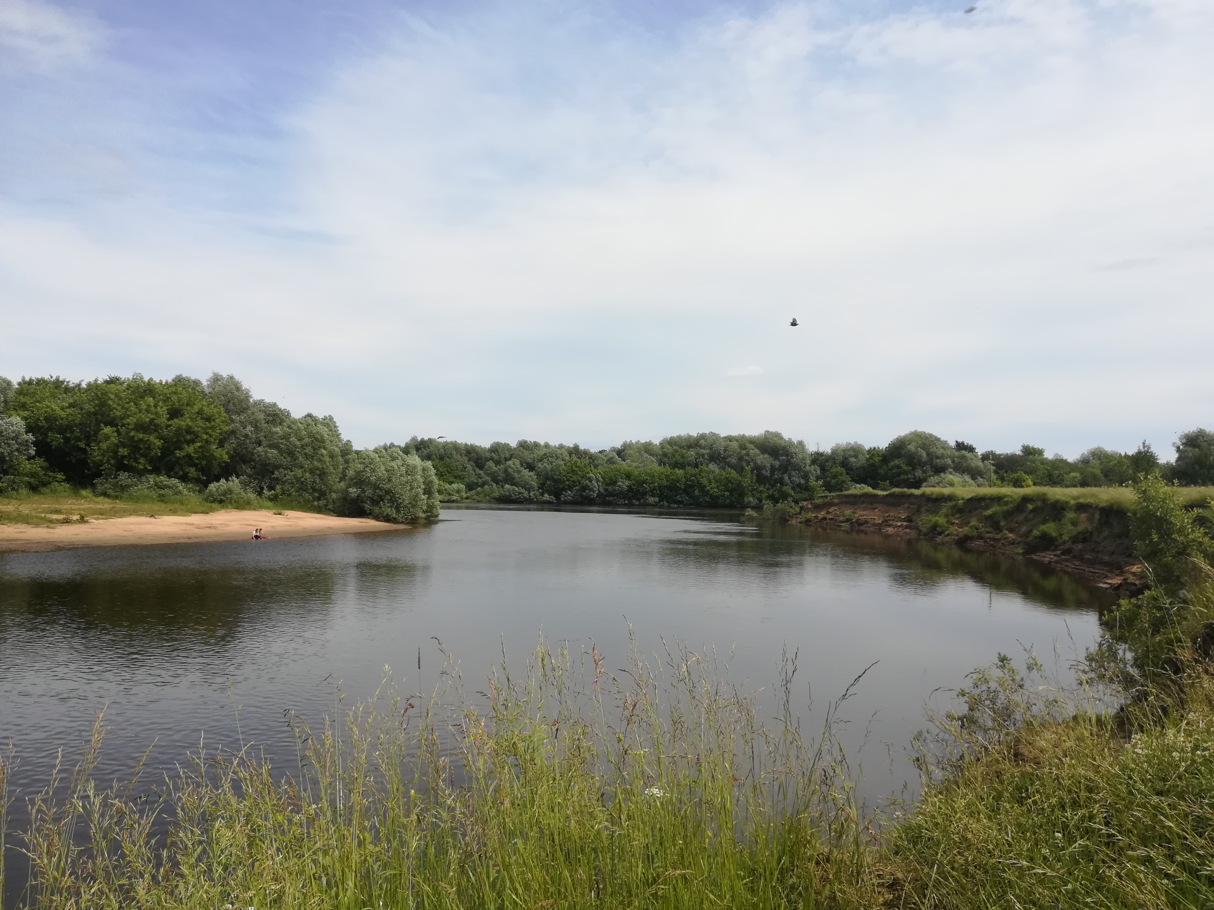 Нерль